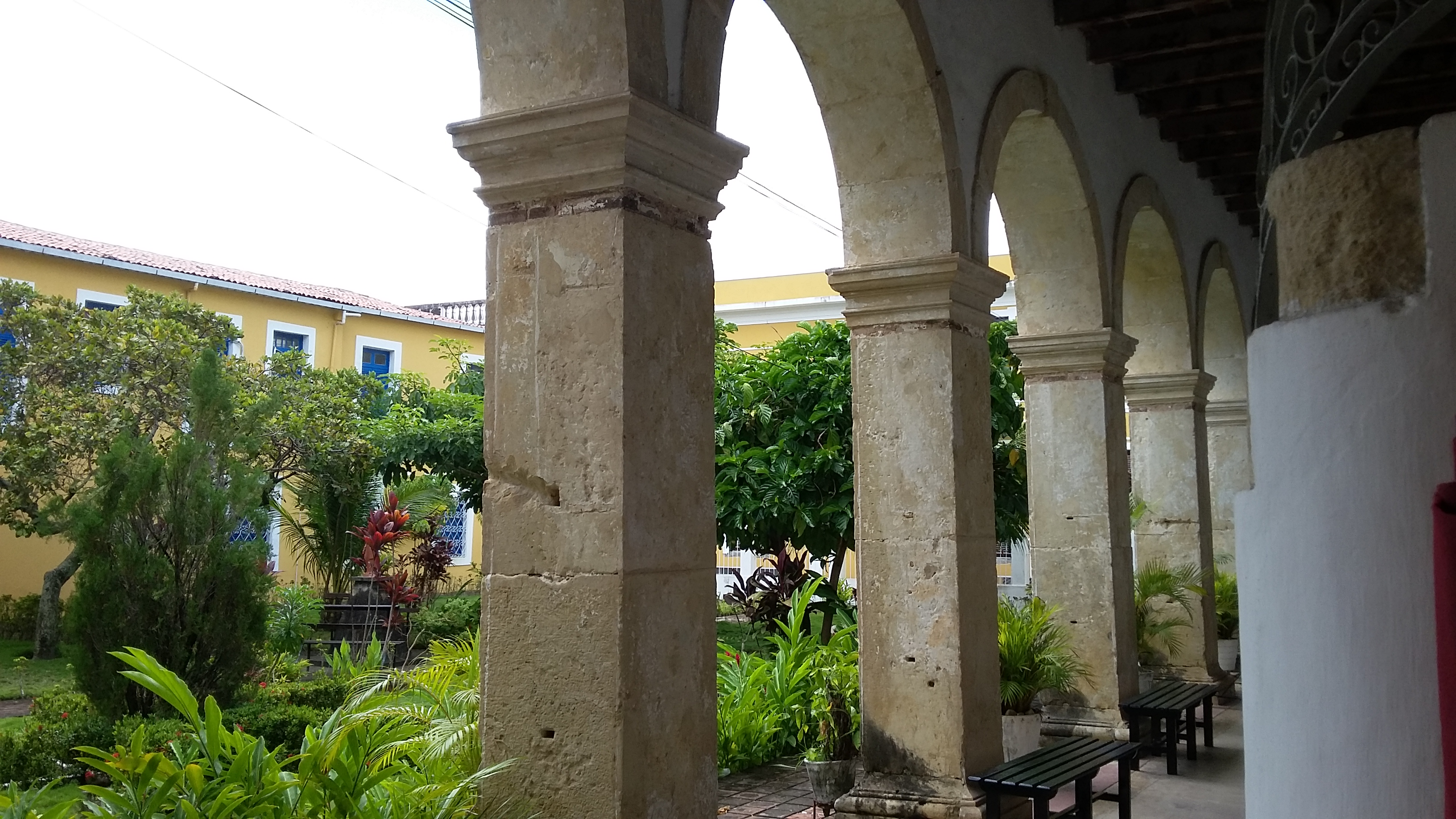 Igreja da Ordem Terceira do Carmo